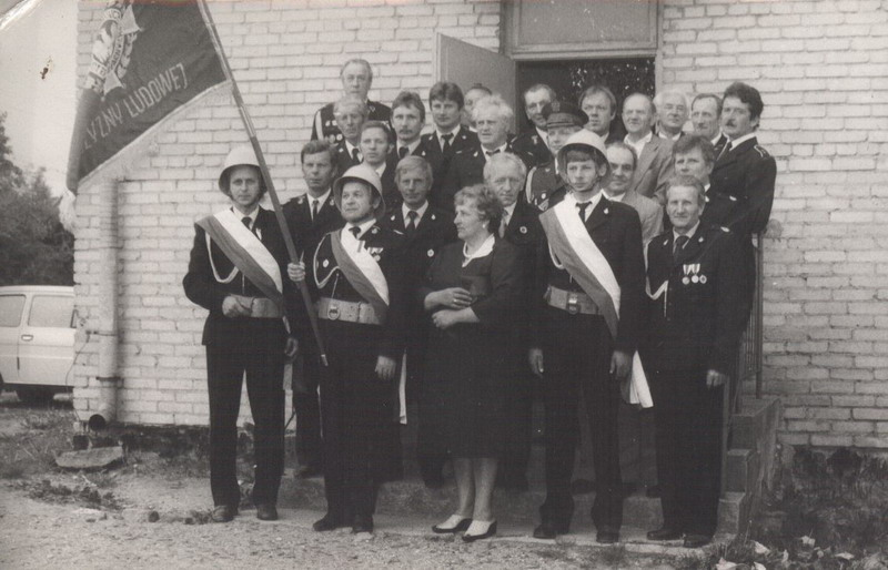 Ochotnicza Straż Pożarna w Niewachlowie